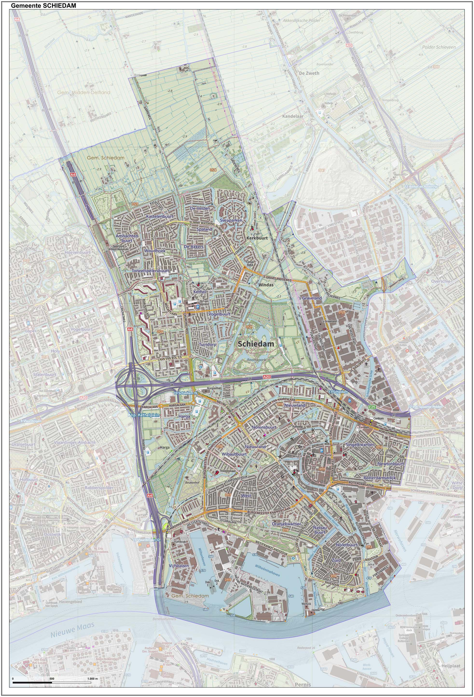 Topografische gemeentekaart. Resolutie: 400 pixels/km. Kaartbeeld samengesteld uit de open geodata van de Top10NL en Top25namen (Kadaster), Creative Commons-BY licentie. Gebouwvlakken uit open geodata BAG extract. Wegen uit de OpenStreetMap, OpenStreetMap community. Reliëfschaduw uit de Actuele Hoogtekaart AHN2. Samenstelling en kleurenschema: Jan-Willem van Aalst, met QGIS. Zie ook de Legenda.